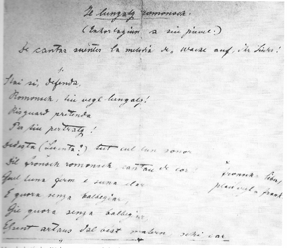 Handschrift von "Al pievel romontsch" von Giachen Caspar Muoth (1844-1906).